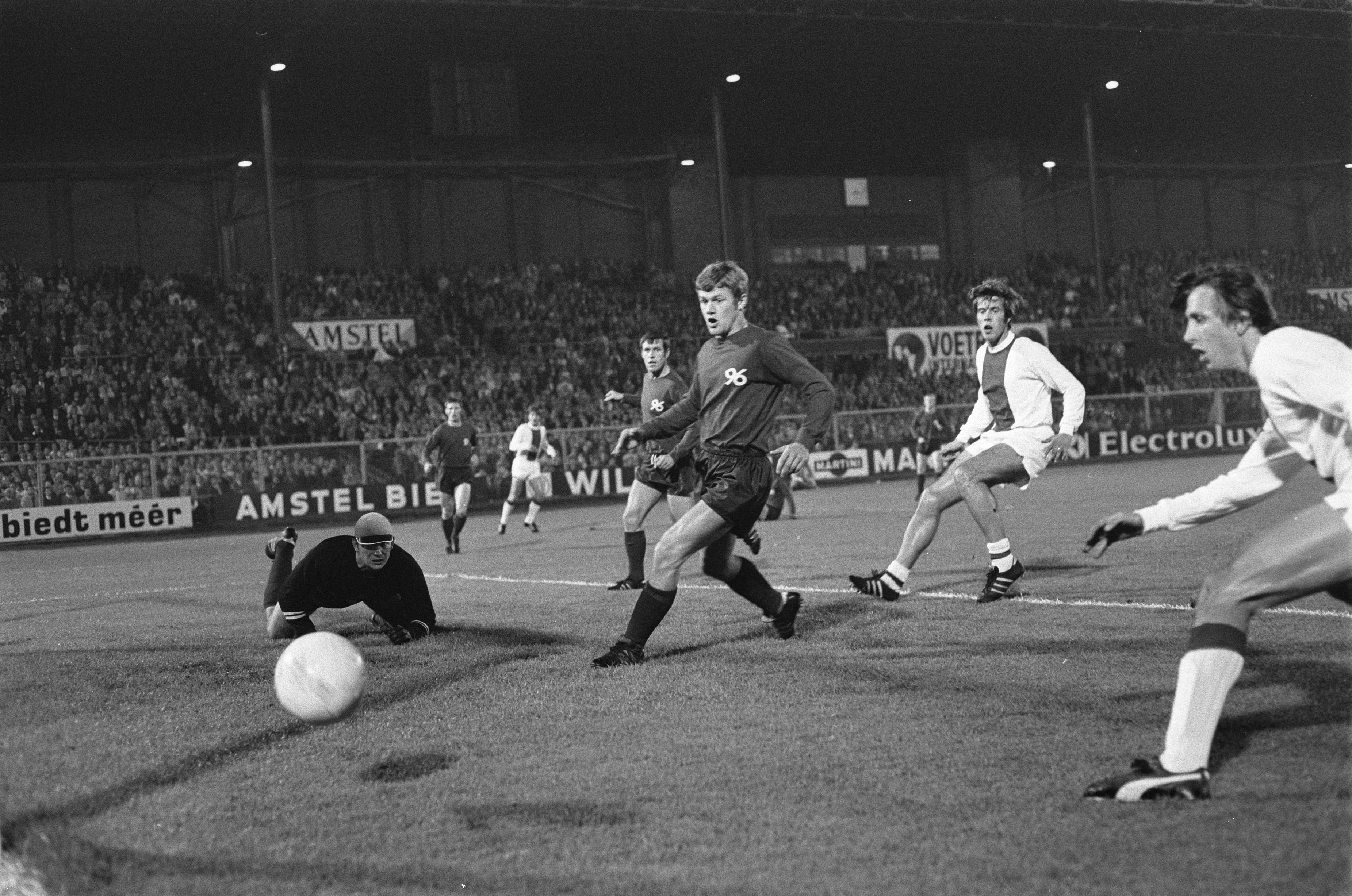 Collectie / Archief : Fotocollectie Anefo Reportage / Serie : [ onbekend ] Beschrijving : Ajax tegen Hannover 96 in Olympisch Stadion A'dam in Europa Cup voor Jaarbeurssteden (3-0). Dick van Dijk schiet en rechts Johan Cruijff Annotatie : In het midden Rainer Stiller Datum : 24 september 1969 Locatie : Amsterdam, Noord-Holland Trefwoorden : sport, voetbal Persoonsnaam : Cruijff, Johan, Dijk, Dick van Instellingsnaam : Europa Cup Fotograaf : Koch, Eric / Anefo Auteursrechthebbende : Nationaal Archief Materiaalsoort : Negatief (zwart/wit) Nummer archiefinventaris : bekijk toegang 2.24.01.05 Bestanddeelnummer : 922-8209